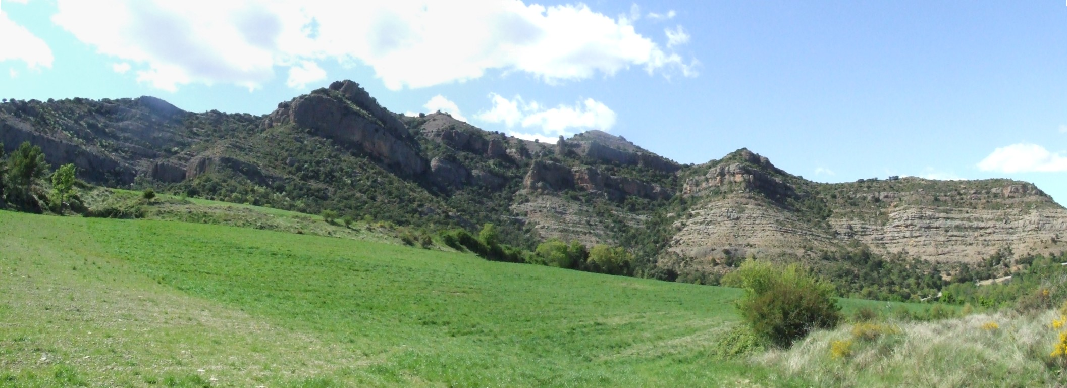 Serra de Sant Salvador (Toralla i Serradell, Conca de Dalt, Pallars Jussà)